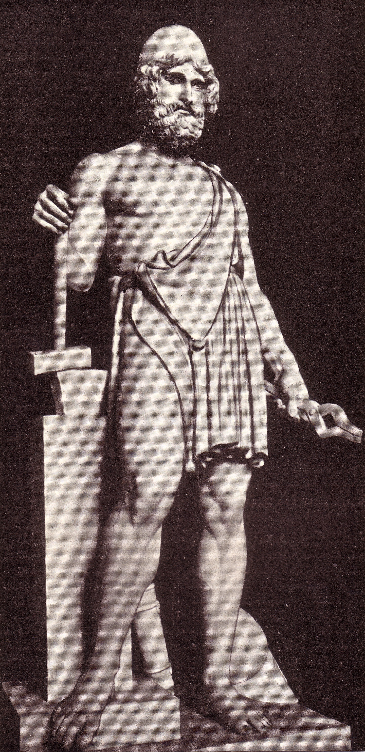 Vulkan, von Bertel Thorvaldsen